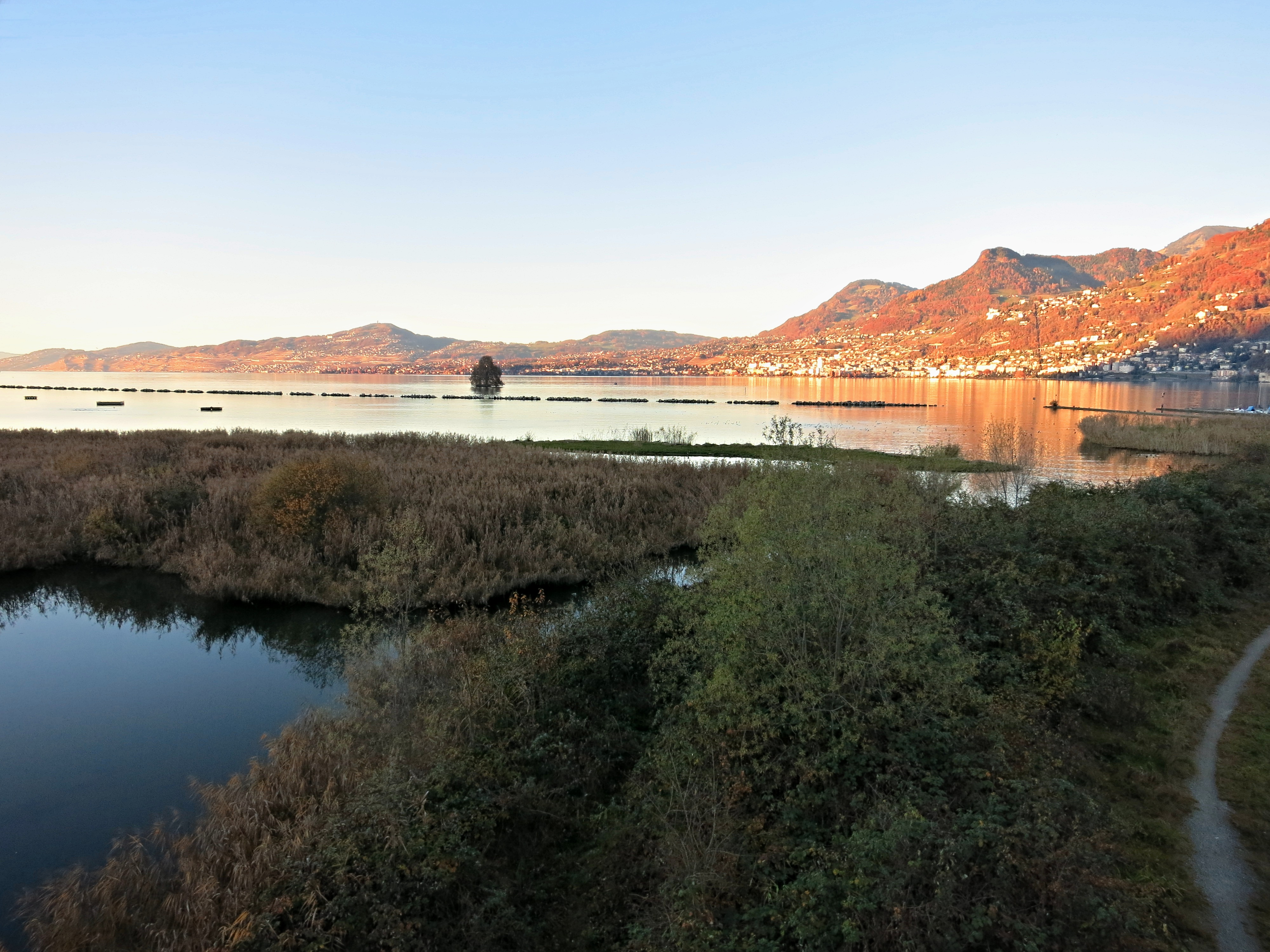 Aussicht vom Vogelbeobachtungsturm Grangettes Richtung Nordosten